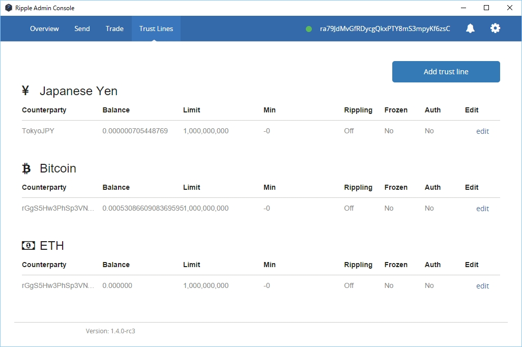 Ripple Admin Consoleでのトラストラインとリップリングの設定